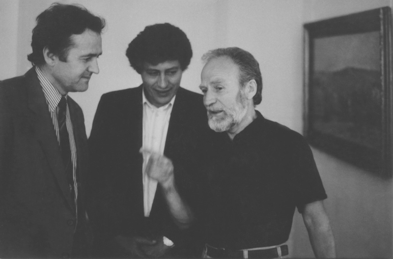 Moldavian poet Ion Hadarca, politician Mihai Ghimpu and artist Mihai Grati.